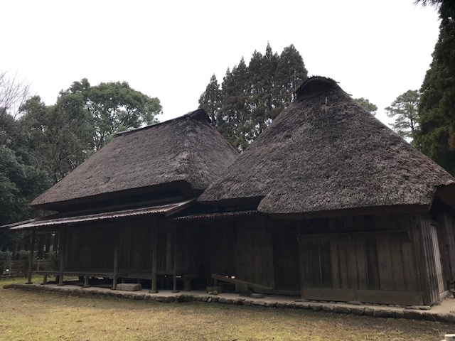 宮崎県総合博物館 民家園にある「旧黒木家住宅」の外観